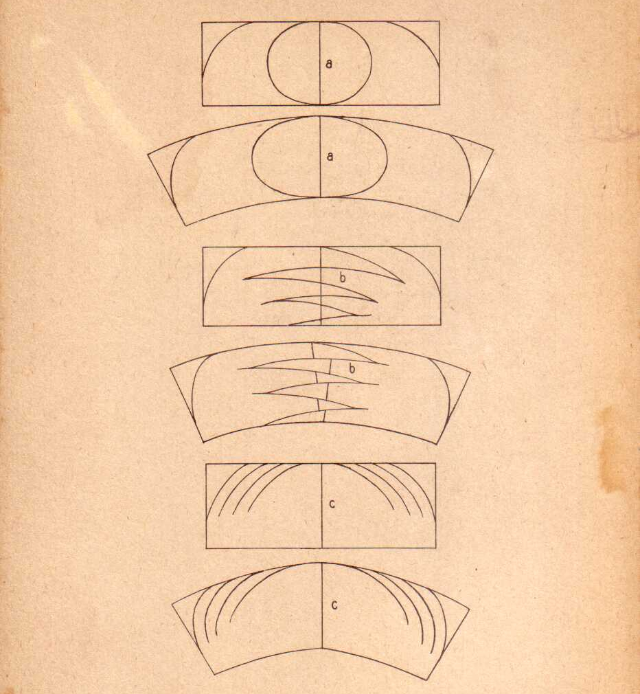 Graphics for Furriers Verschiedene Auslass-Schnitte bei Seeotterkragen